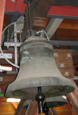 Description – Mettglocke. Kleinste Glocke des Dachreiters, Kölner Dom. Source – own work Date – Sommer 2006 Author – Andreasdziewior